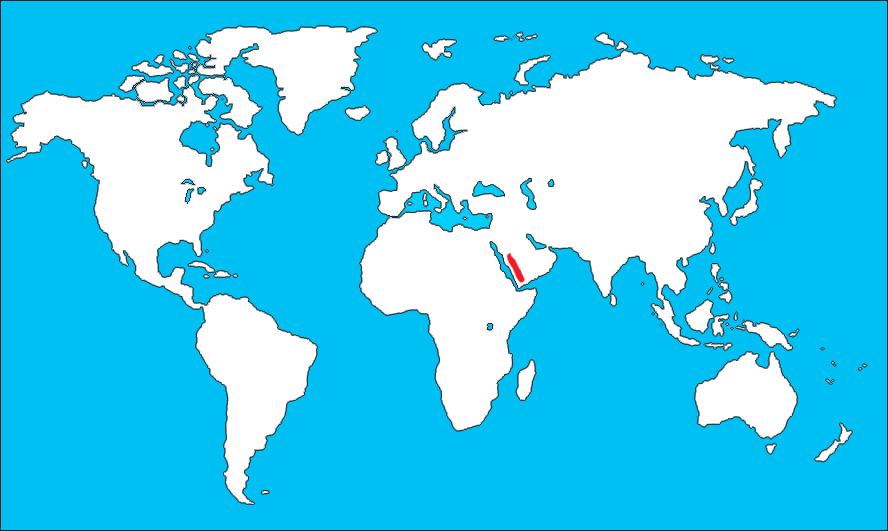 Turdus menachensis elterjedési területe